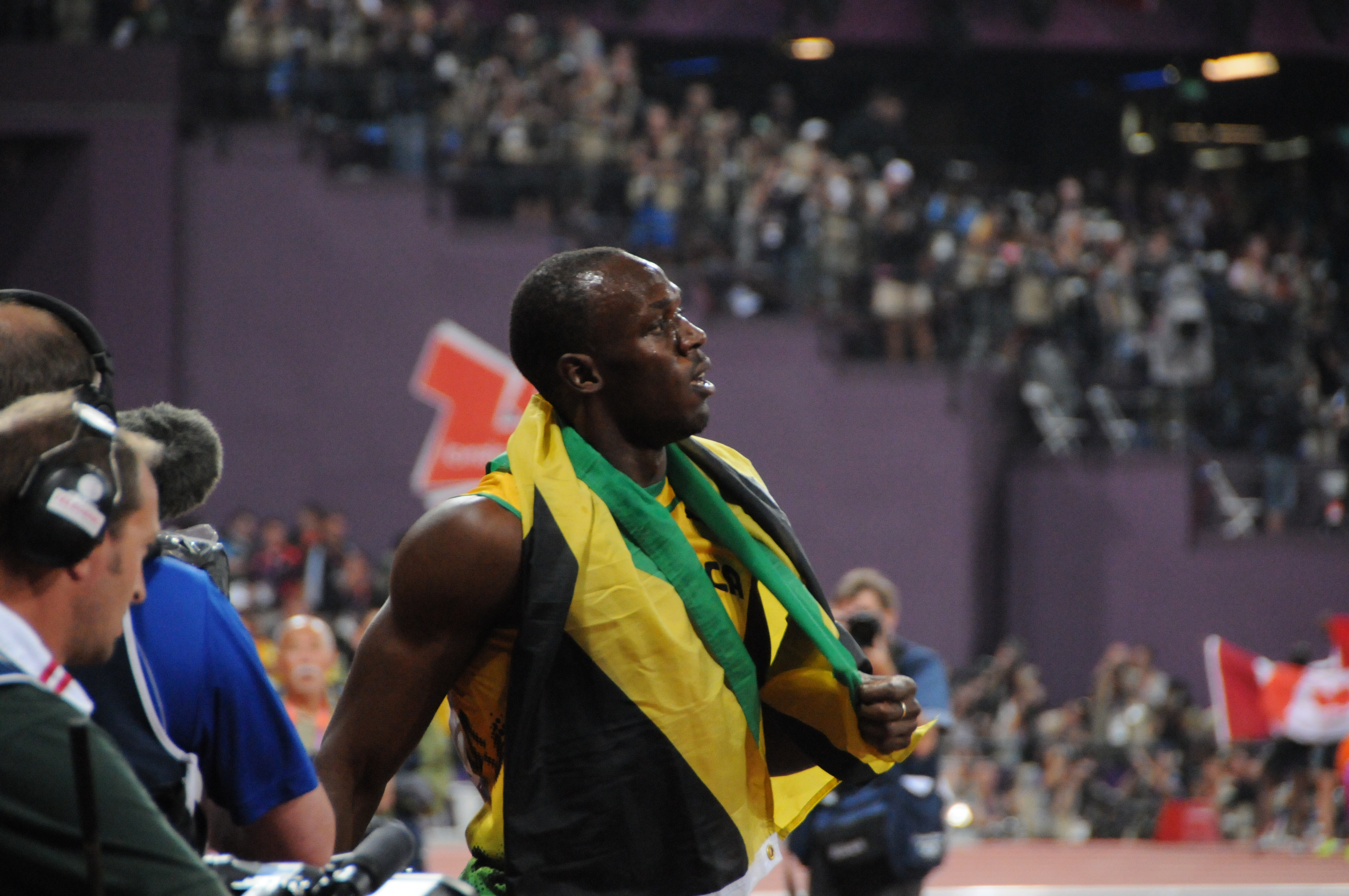 Usain Bolt l'éclair :)